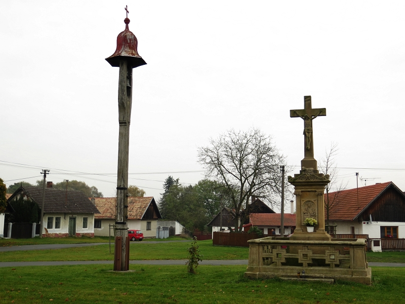 Zvonička s křížem, náves, Pojedy.